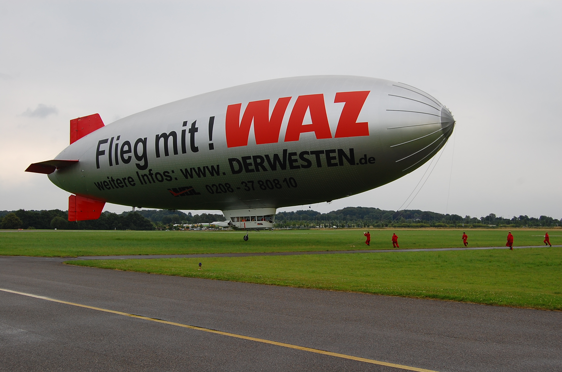 WDL Luftschiff mit Aufdruck WAZ